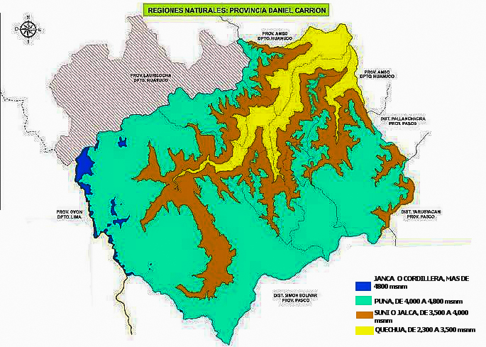 Regiones Naturales de la Provincia Daniel Alcides Carrión, Pasco, Perú según INRENA